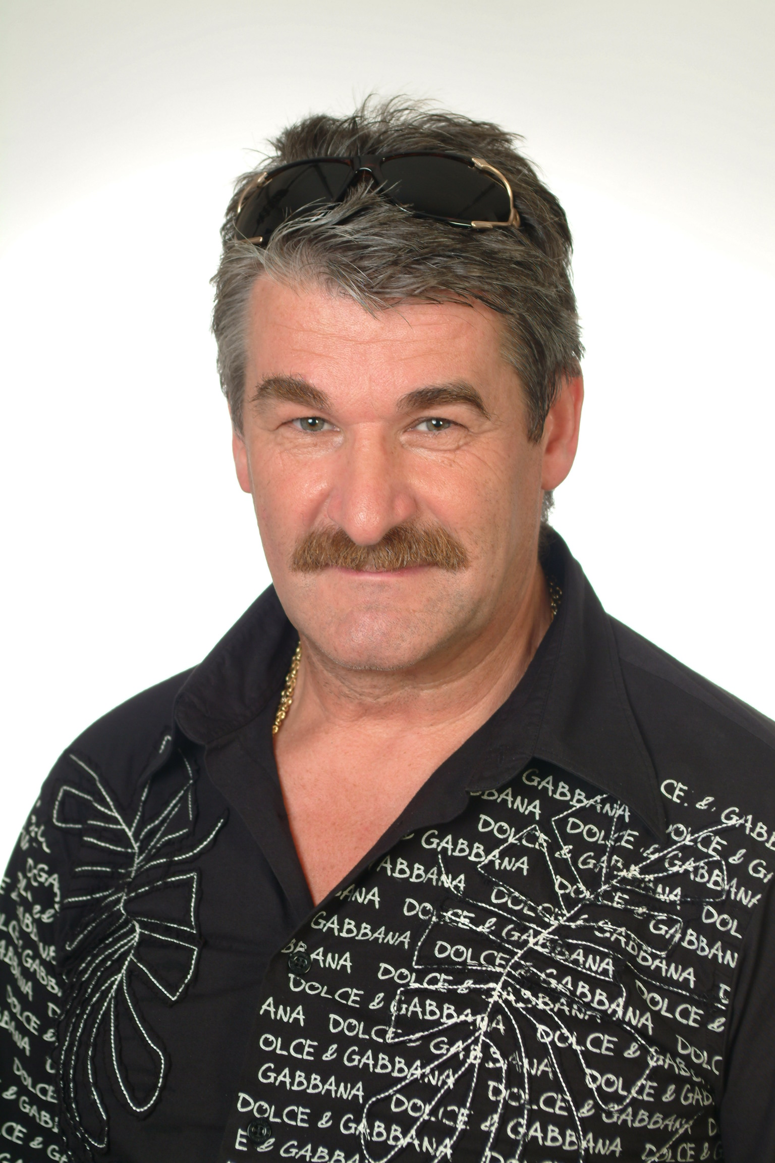 Der Maler, Airbrusher und Fotograf Ingolf Kühn